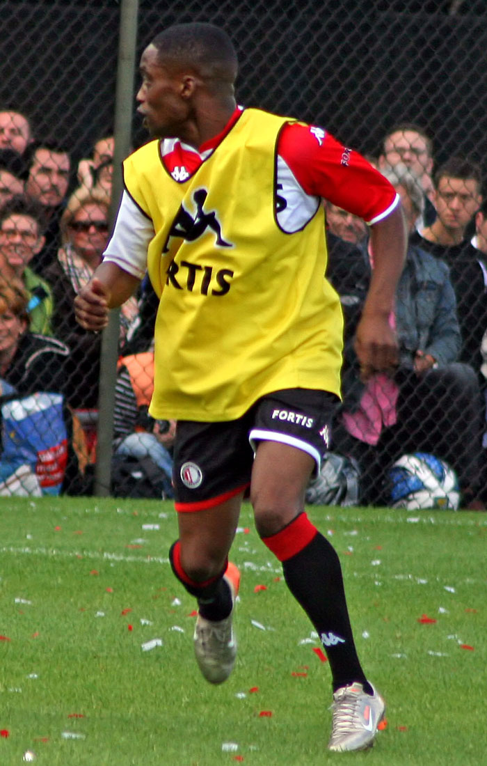 Andwélé Slory (Feyenoord)